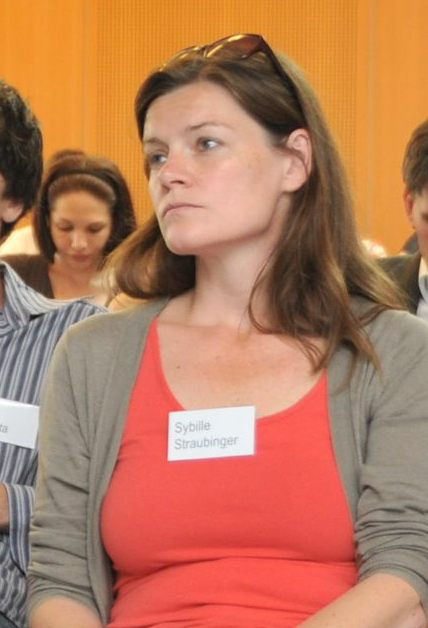 Sybille Straubinger bei der Eröffnung der OGD2011 Konferenz am 16. Juni 2011 in Wien.